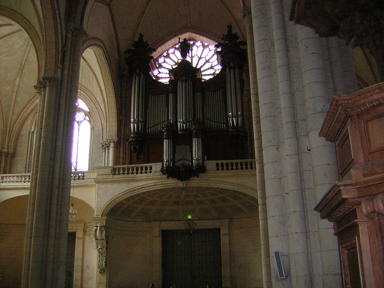 Poitiers:Catedral de Saint-Pierre de Poitiers.